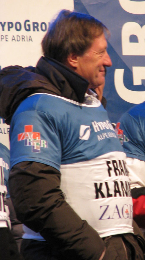 Franz Klammer